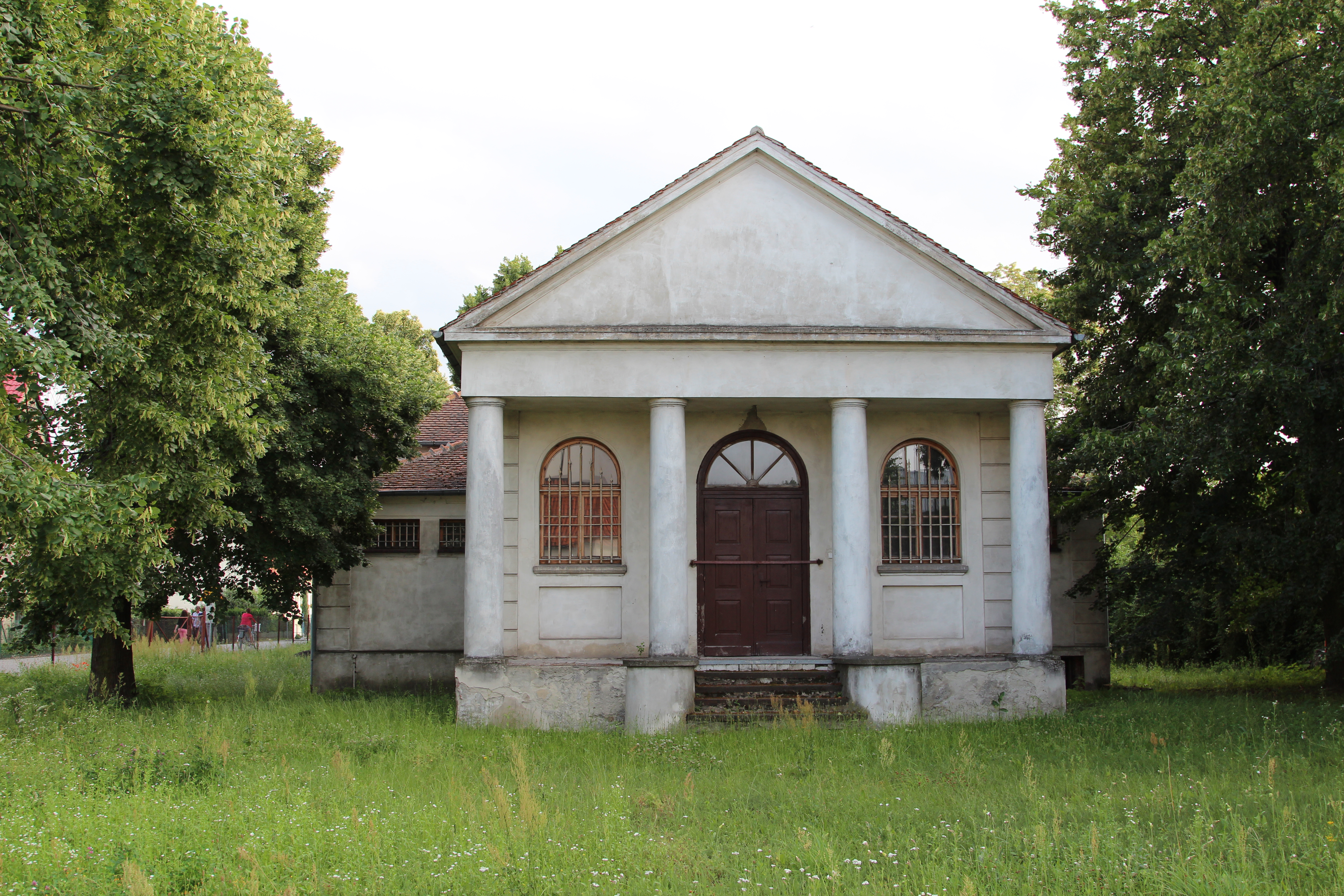 Lutynia, budynek d. Muzeum Bitwy pod Lutynią, ok. 1920